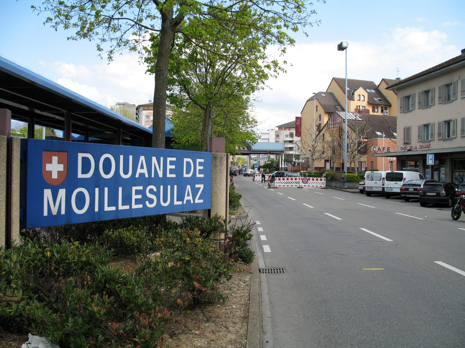 Douane franco-suisse de Moillesulaz, sur la commune de Thônex